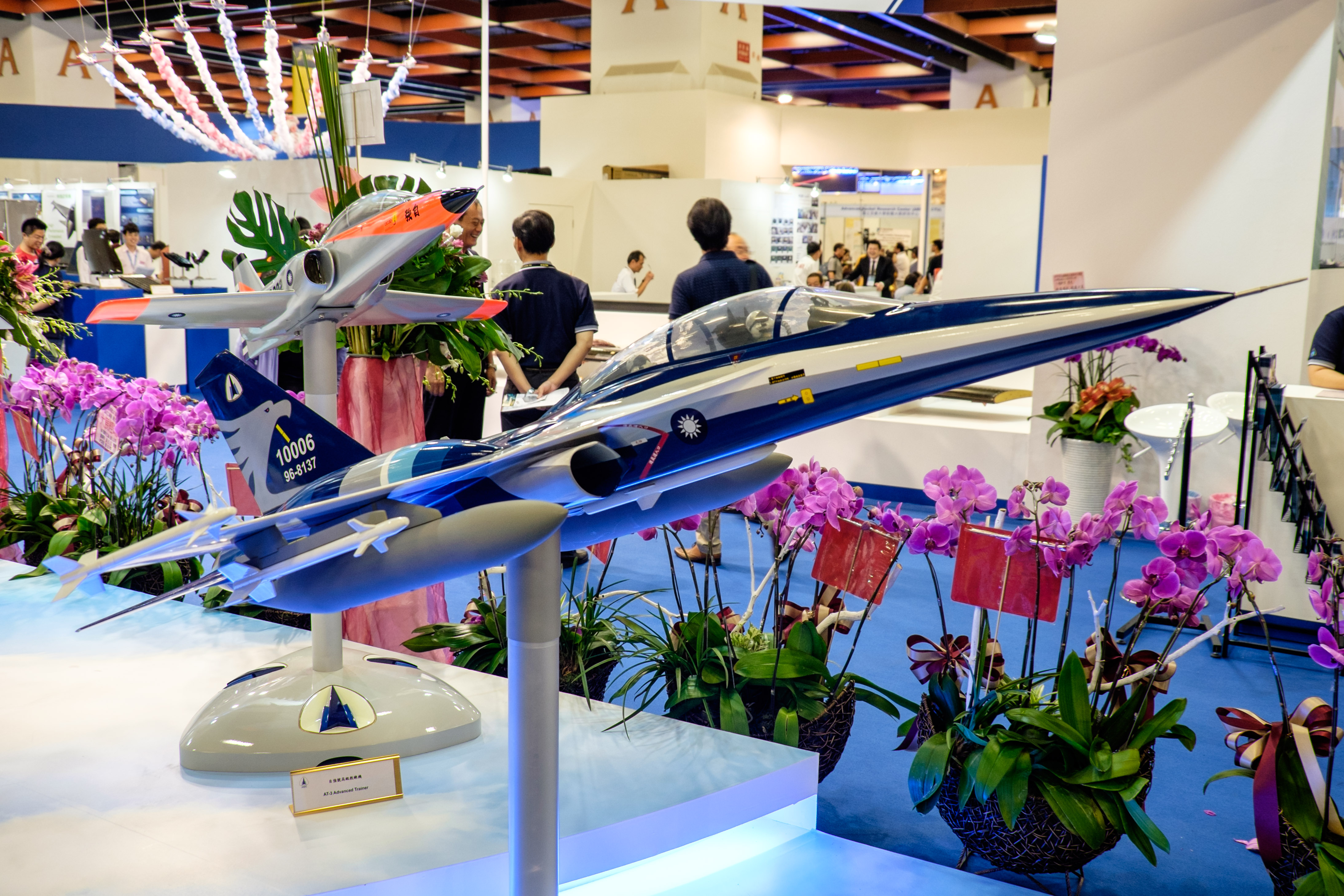 2015台北國際航太暨國防工業展覽會第三日，漢翔攤位展示F-CK-1 C/D翔昇戰機模型。